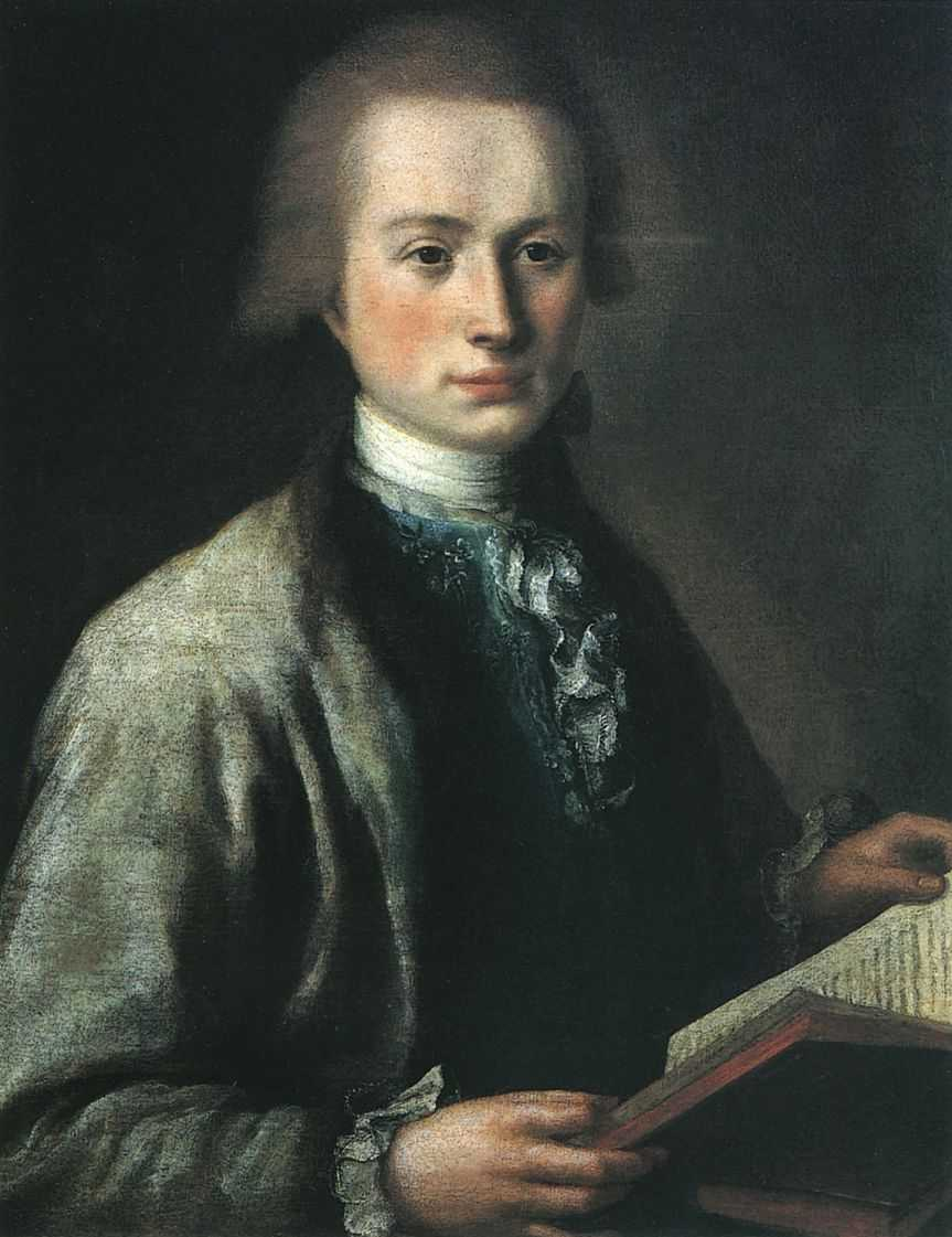 Шибанов Михаил. Портрет Спиридова Алексея Григорьевича (1753 – 1828). 1772